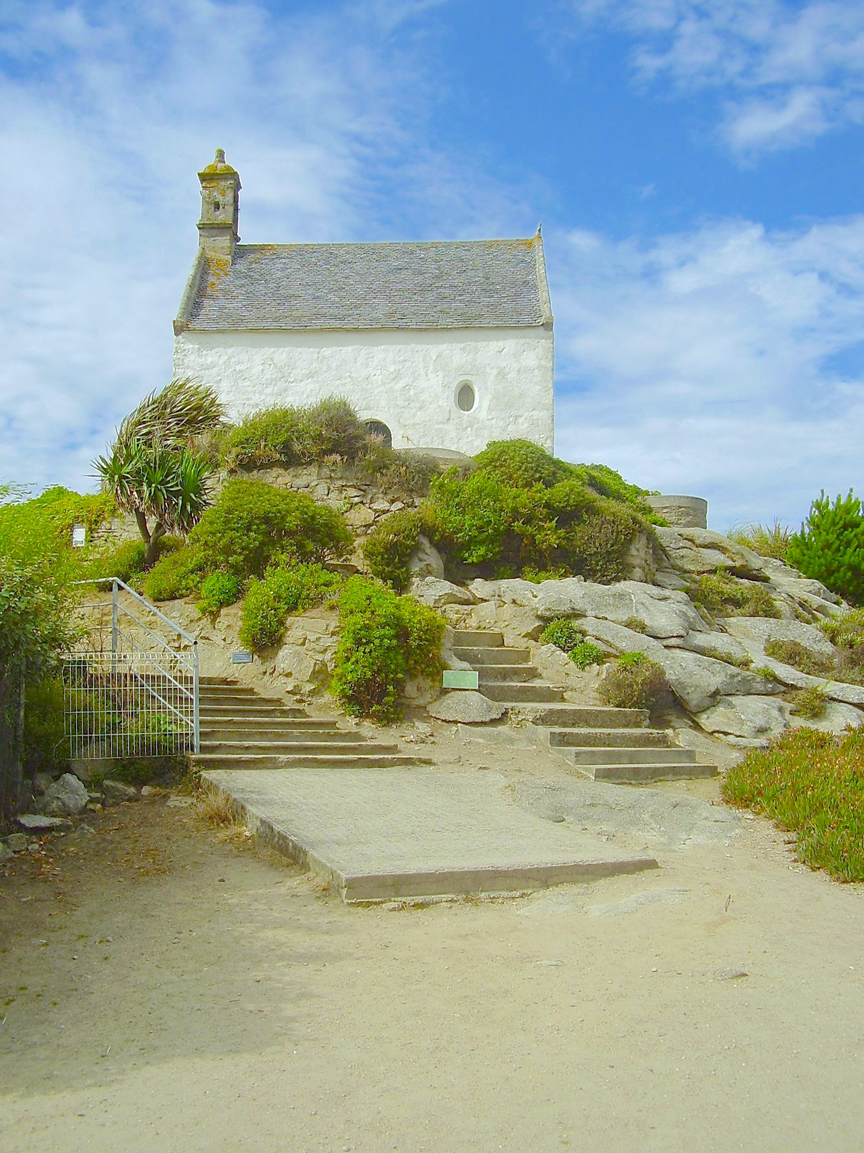 Roscoff, Bretagne; Frankreich